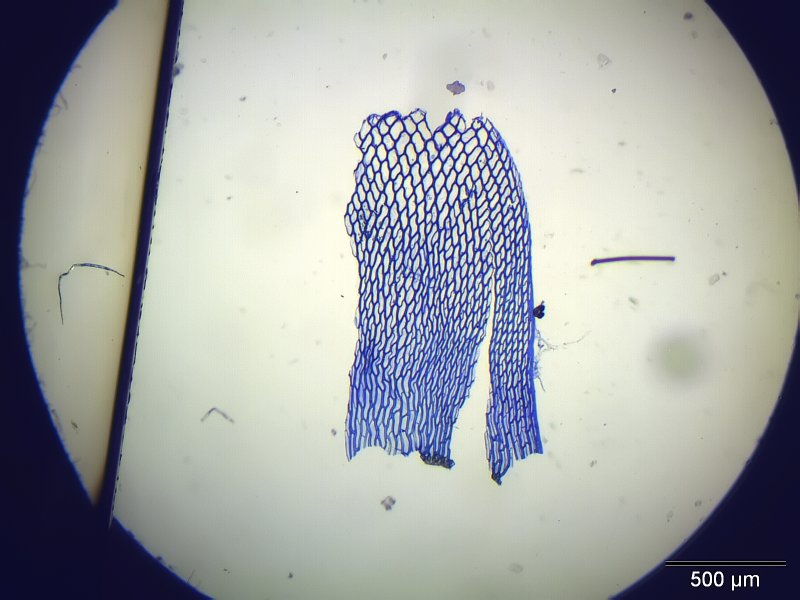 Sphagnum teres, Stammblatt, 40x